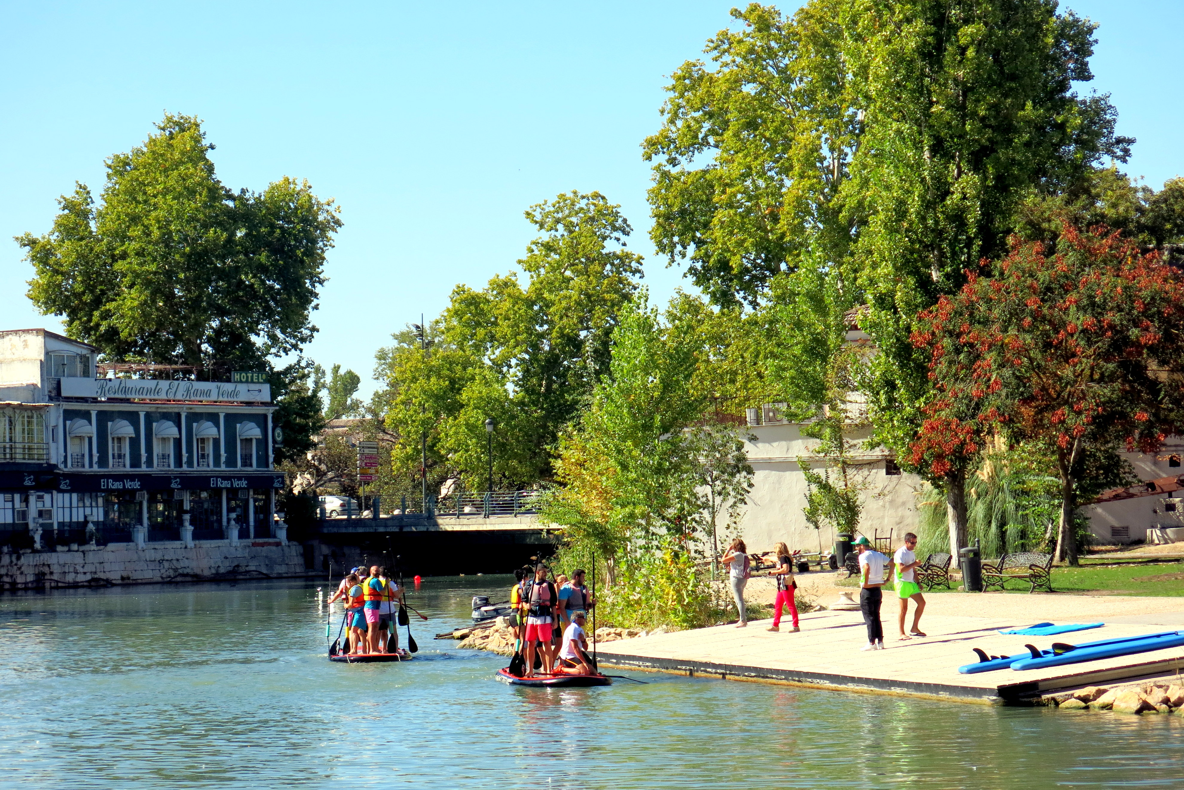 entrenamiento en el río Tajo